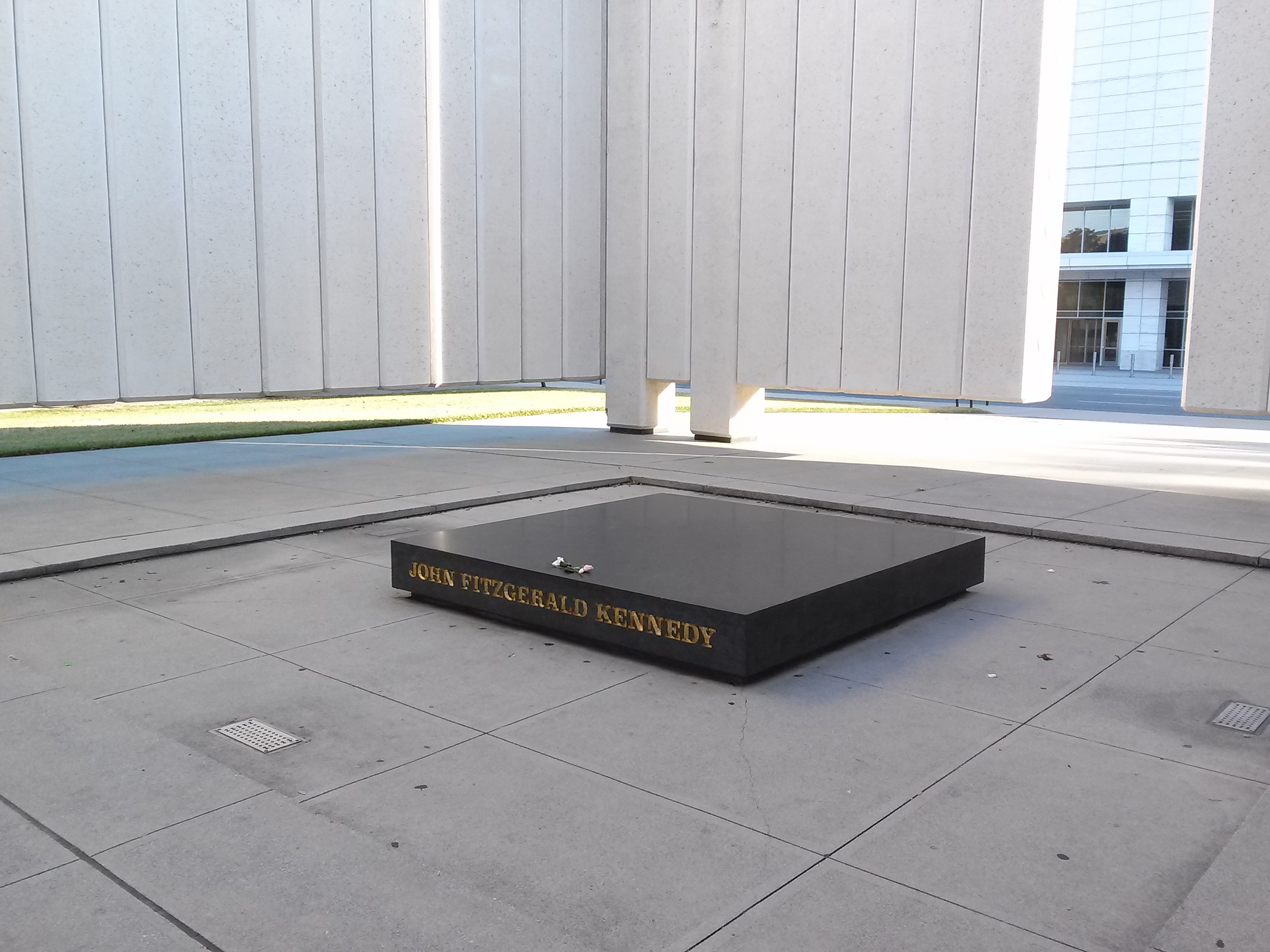 Interior del Momonumento John F. Kennedy en el centro de Dallas